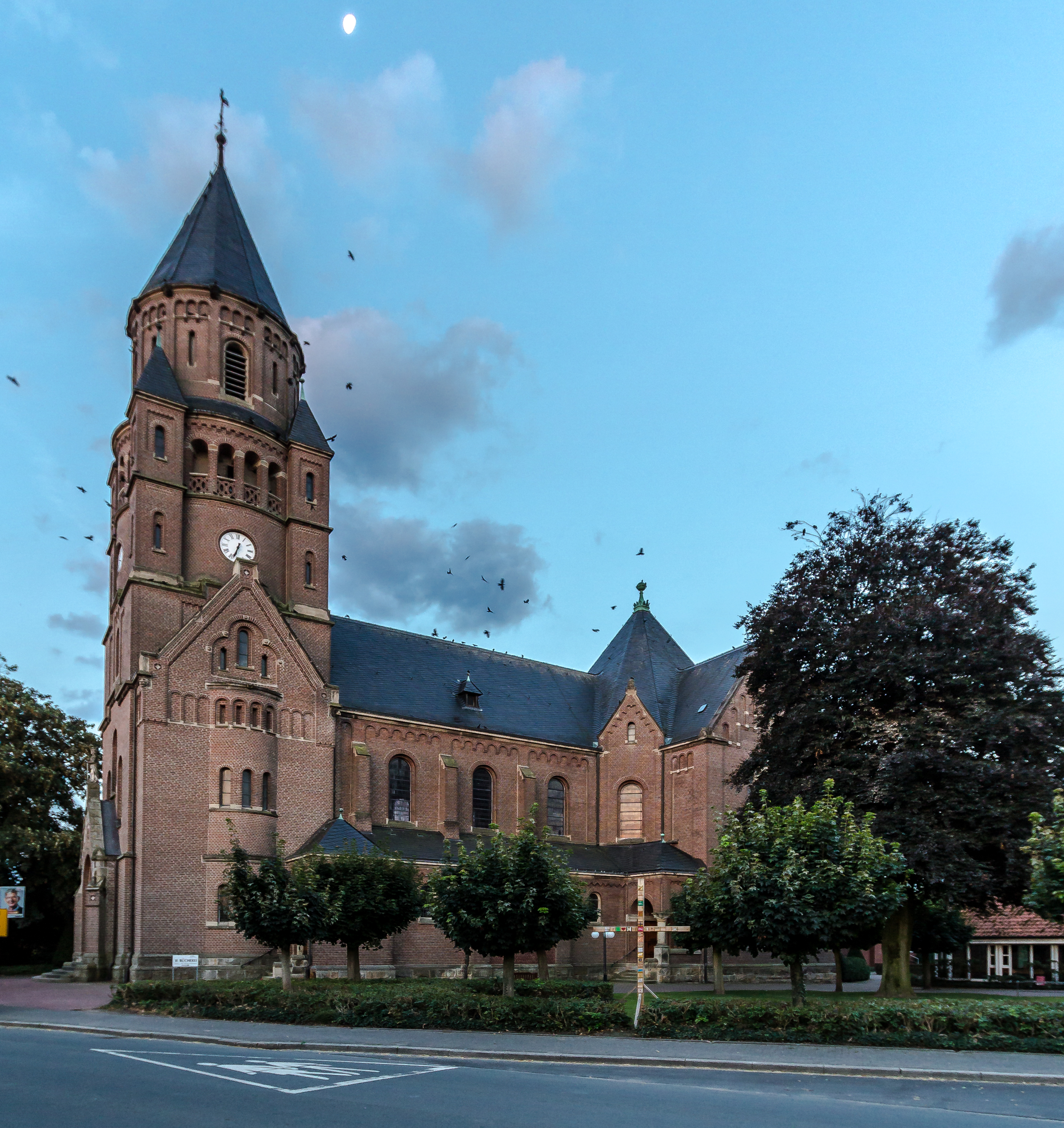 St.-Georg-Kirche in Hiddingsel, Dülmen This image shows a heritage building in Germany, located in the North Rhine-Westphalian city Dülmen (no. 24).